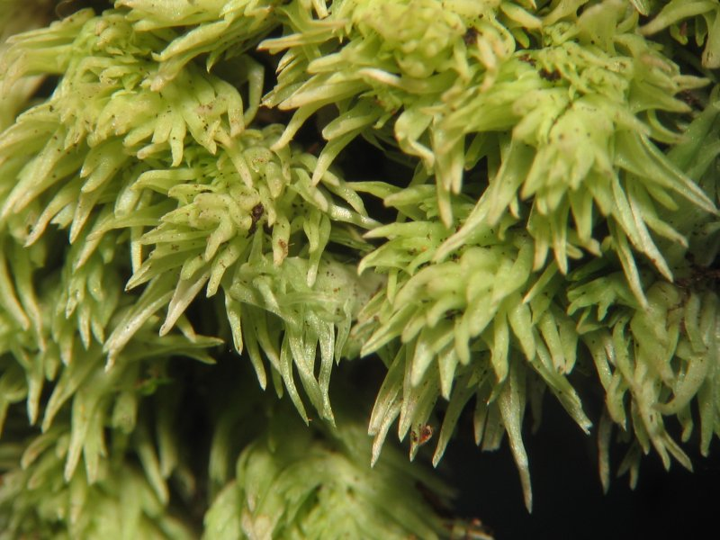 Leucobryum glaucum, Hiddensee